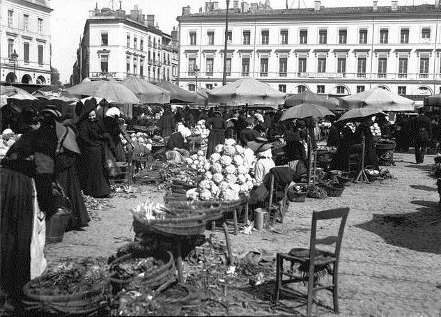 Marché place du Capitole. 20 avril 1900. Vue du côté nord-ouest de la place prise depuis le centre. Au premier plan paniers de fleurs, chaises ; au second plan étals sous parosol, personnages ; en arrière-plan façades sur la place.